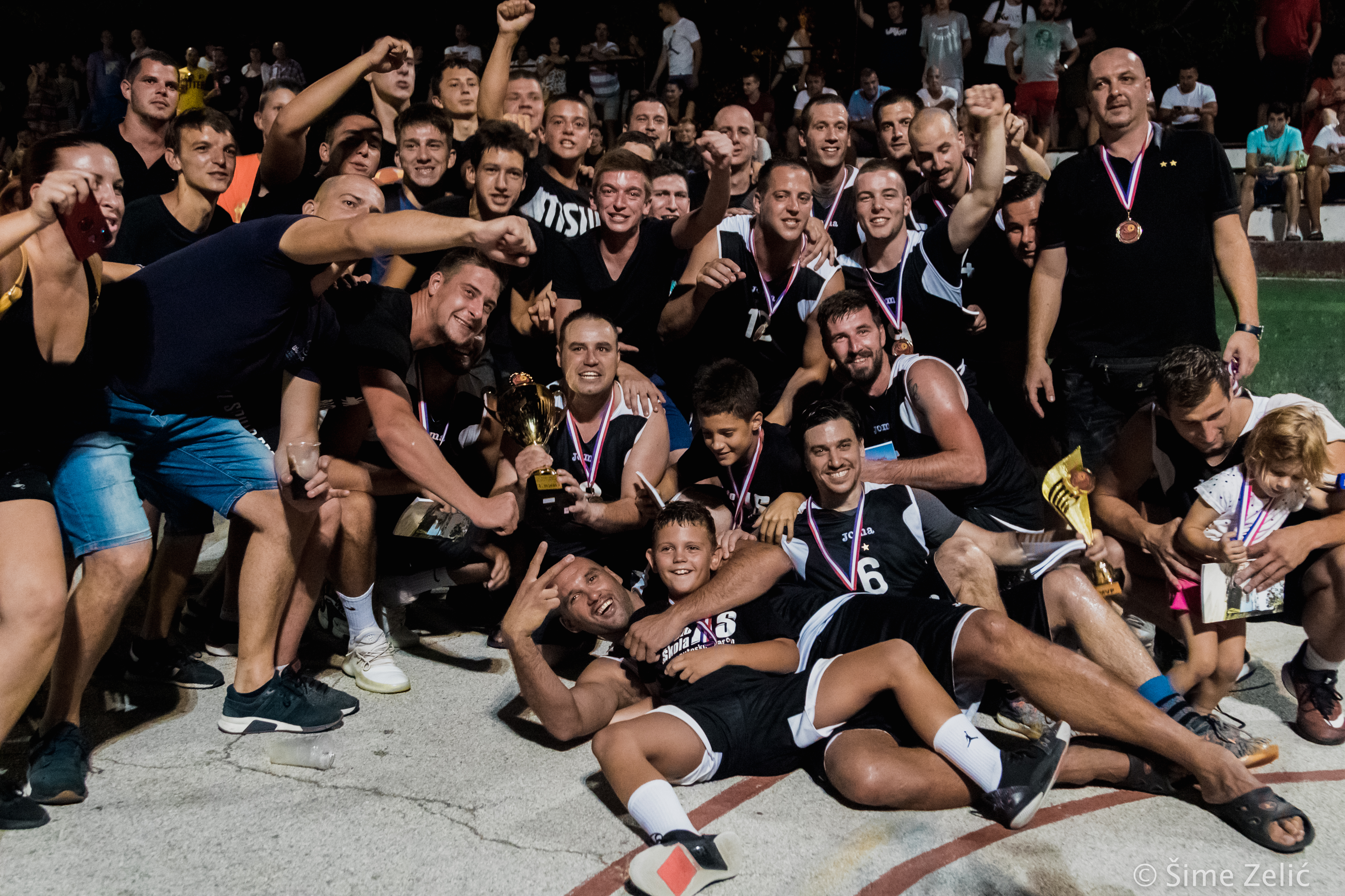 KK Bokanjac - osvajač Zadarske ljetne lige 2019.